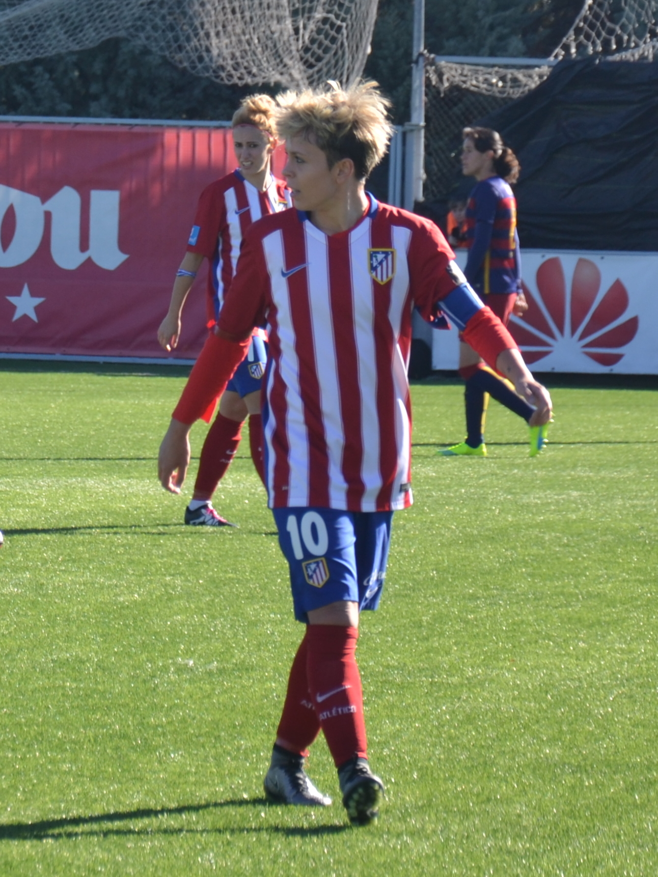 Partido contra el Barcelona el 16-01-2016